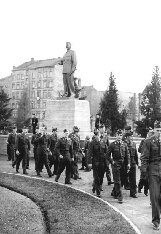 ADN-ZB-Martin-26.10.1951 Berlin: Eine Gruppe amerikanischer Soldaten besichtigt das Stalin-Denkmal in der Stalinallee.